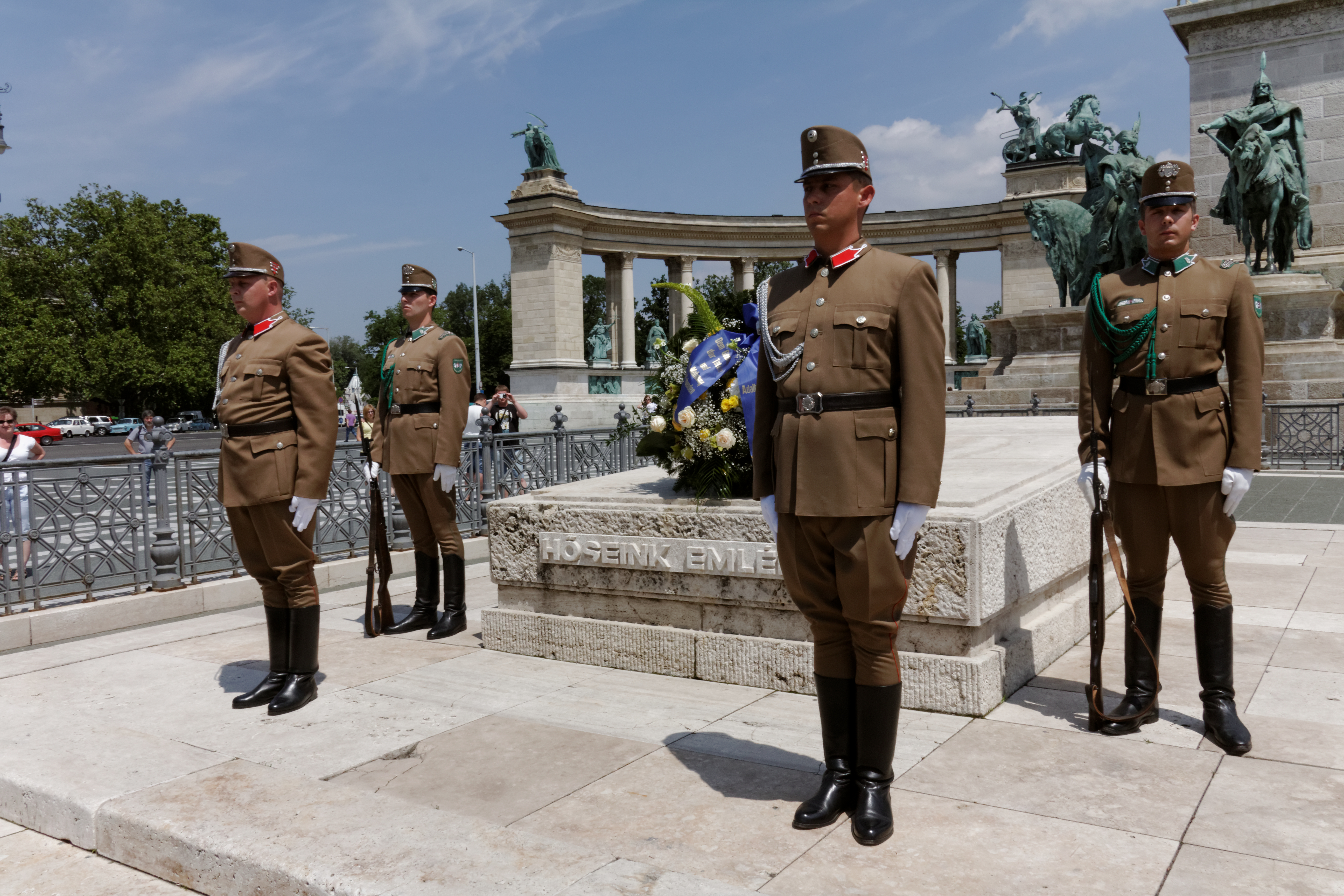 Budapest Heldenplatz nach Kranzniederlegung